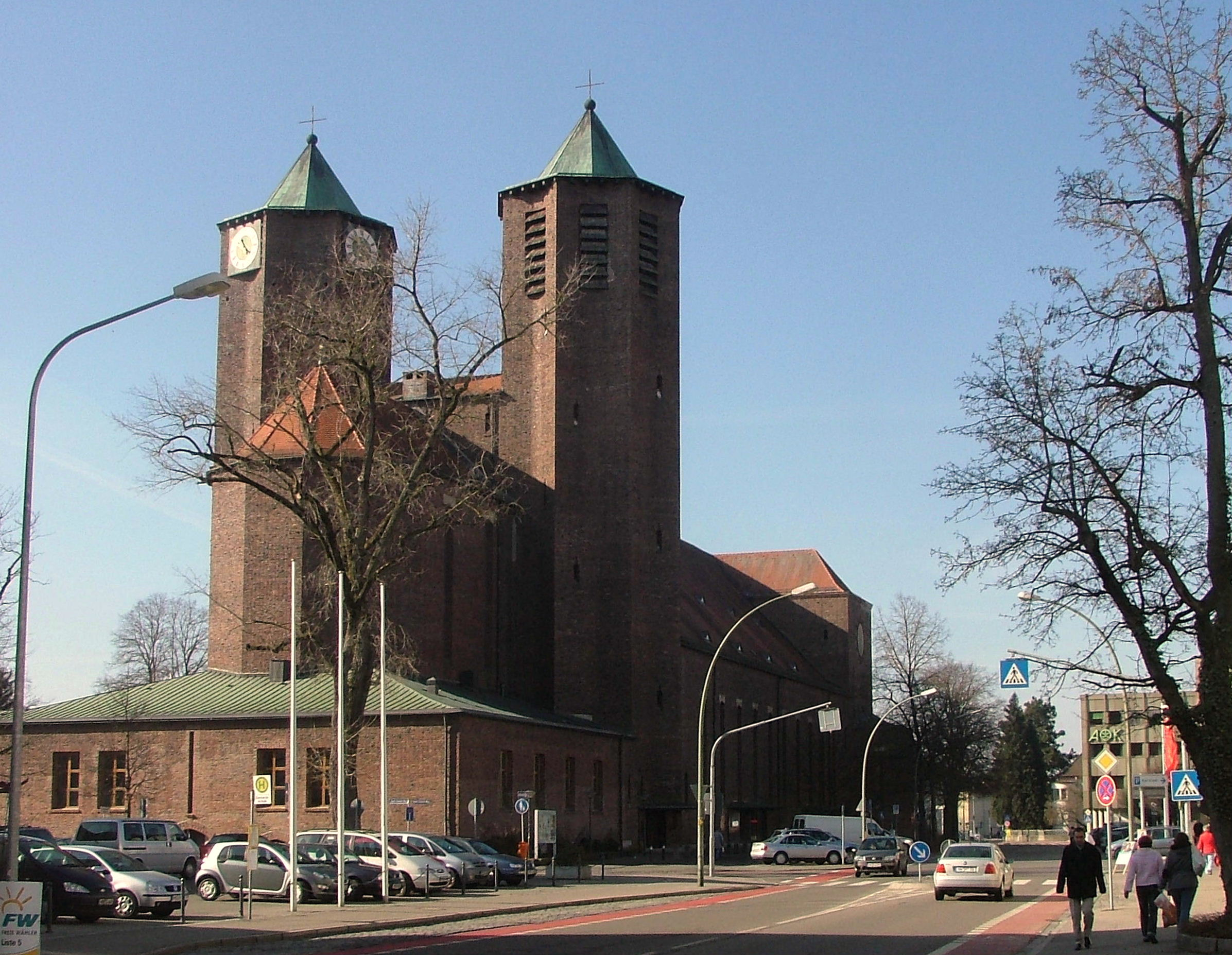 St.Joseph